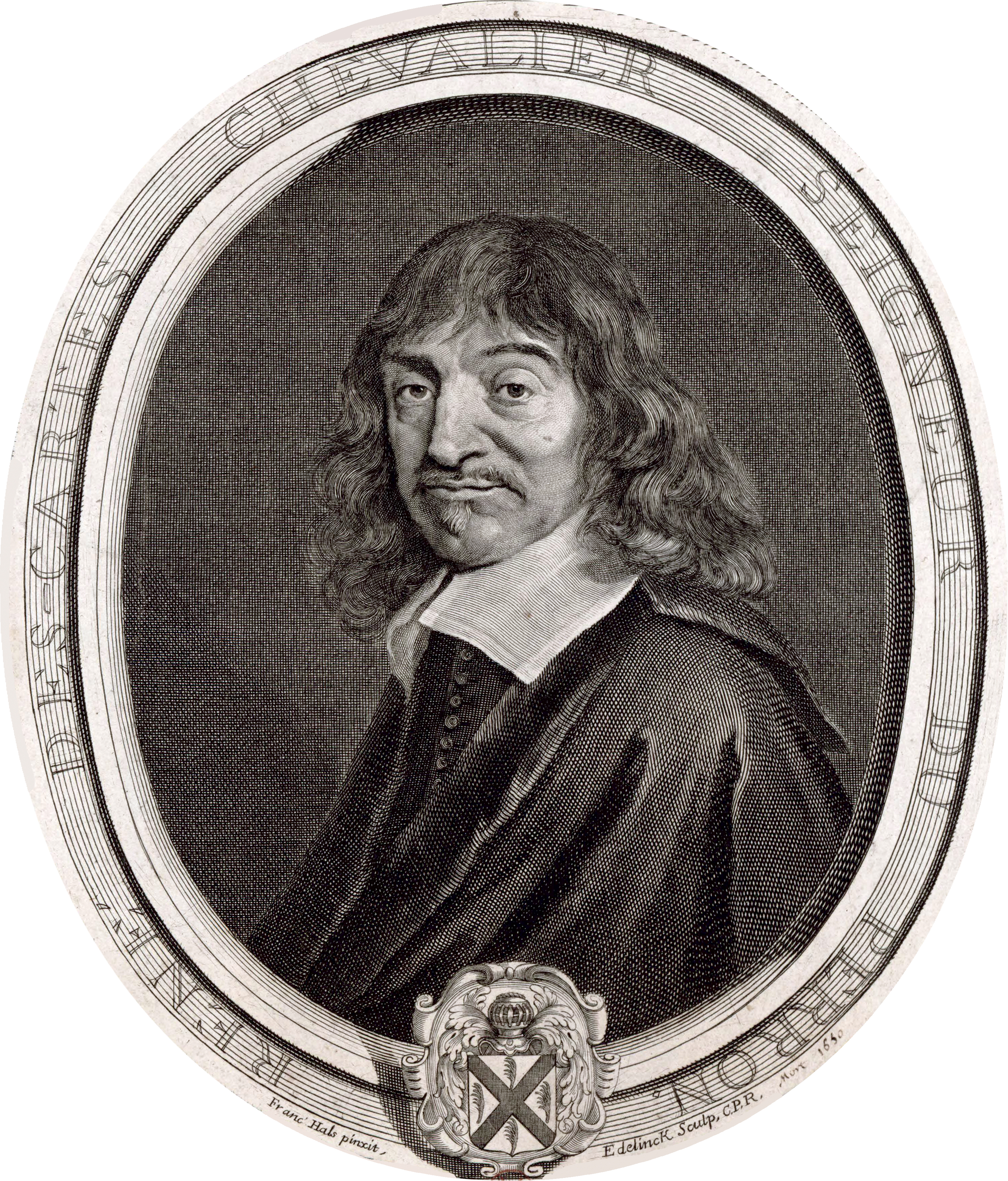 Portrait de René Descartes, en buste, de 3/4 dirigé à gauche dans une bordure ovale.